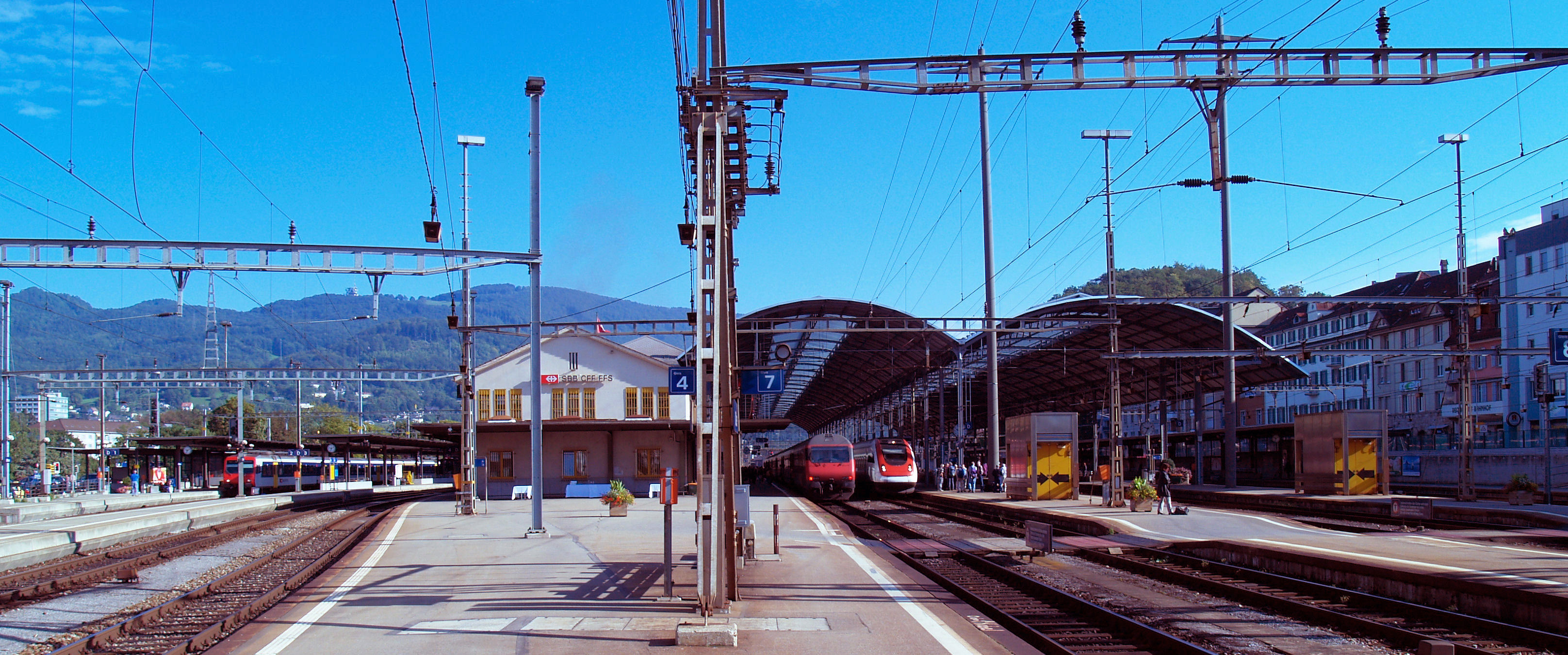 Sicht auf die Westseite des Bahnhof Olten (von links nach rechts Gleis 1-4 Westfassade Postgebäude Gleis 7-12)